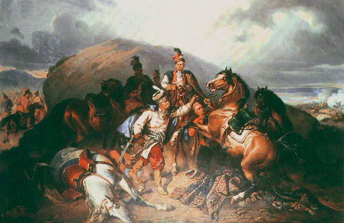 Бродовский, Юзеф (1828-1900). На поле битвы